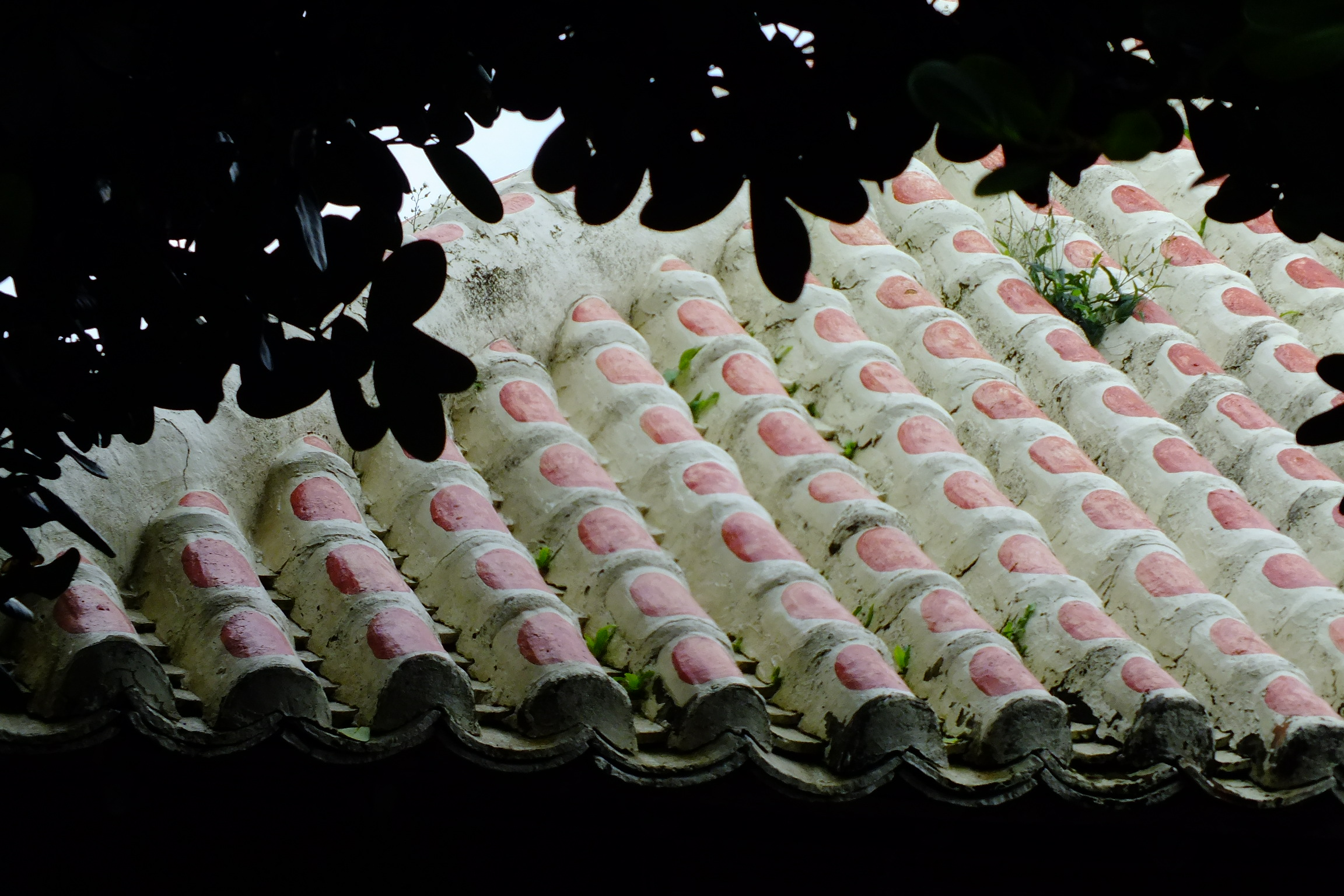 2015-12-17 Haterumajima、Ryukyu-gawara 波照間島の琉球瓦屋根 DSCF2555